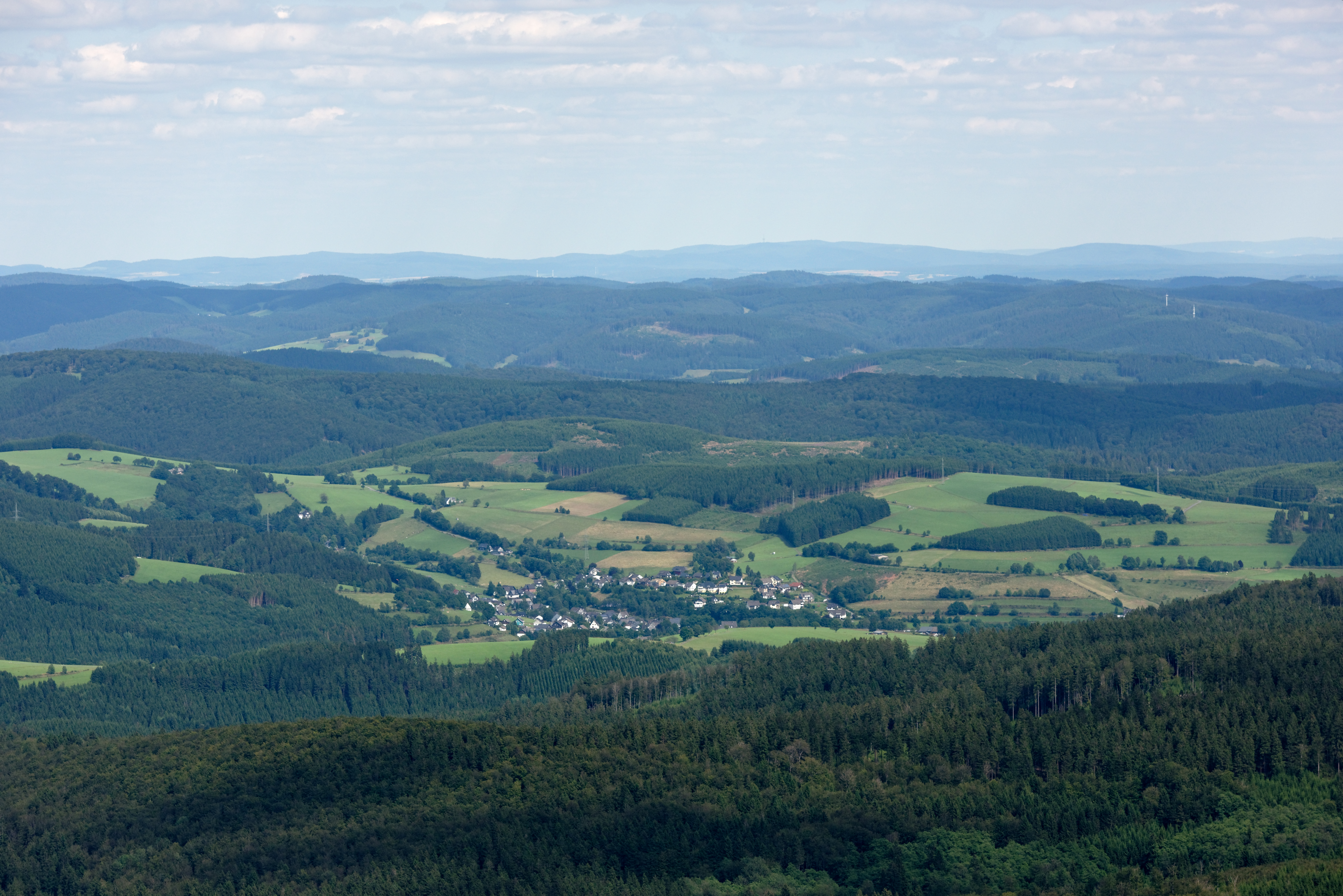 Luftaufnahme: Wingeshausen, Blick Richtung Osten, Nordrhein-Westfalen